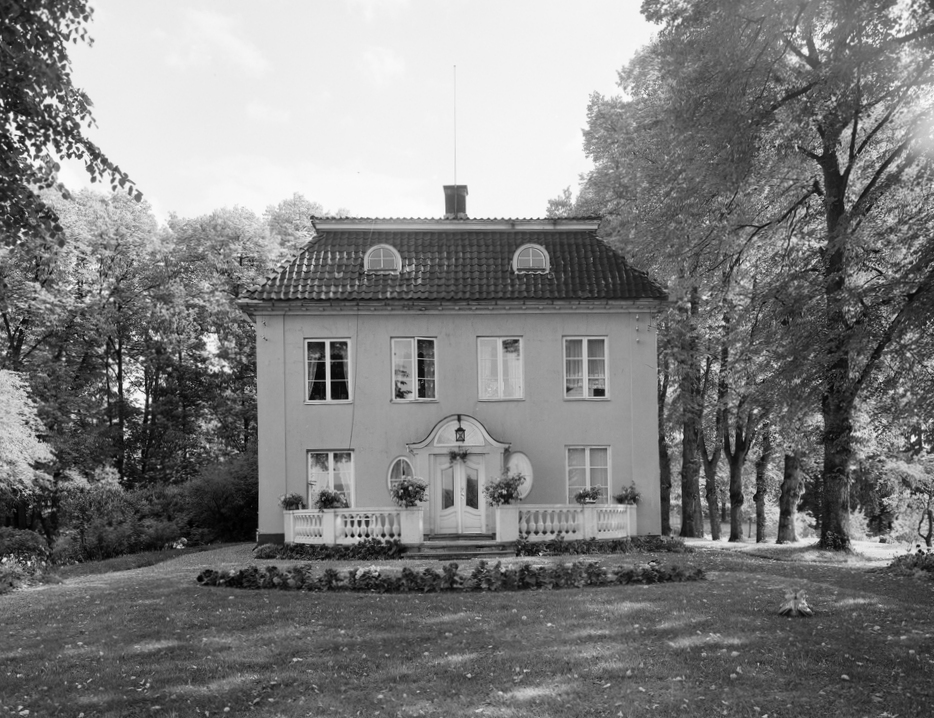 Søndre Høvik gård, 1959